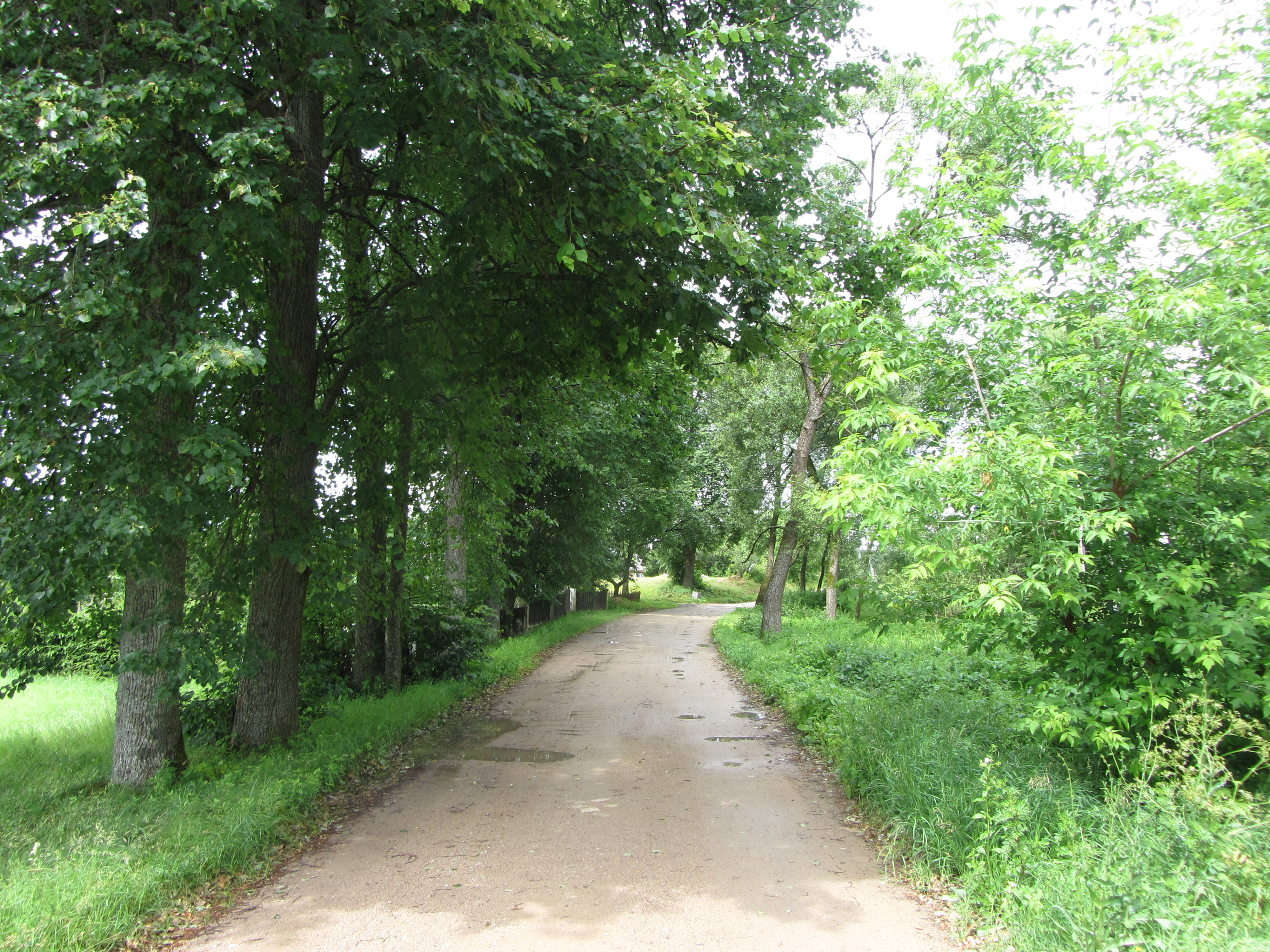 Adomčiškės, Lithuania